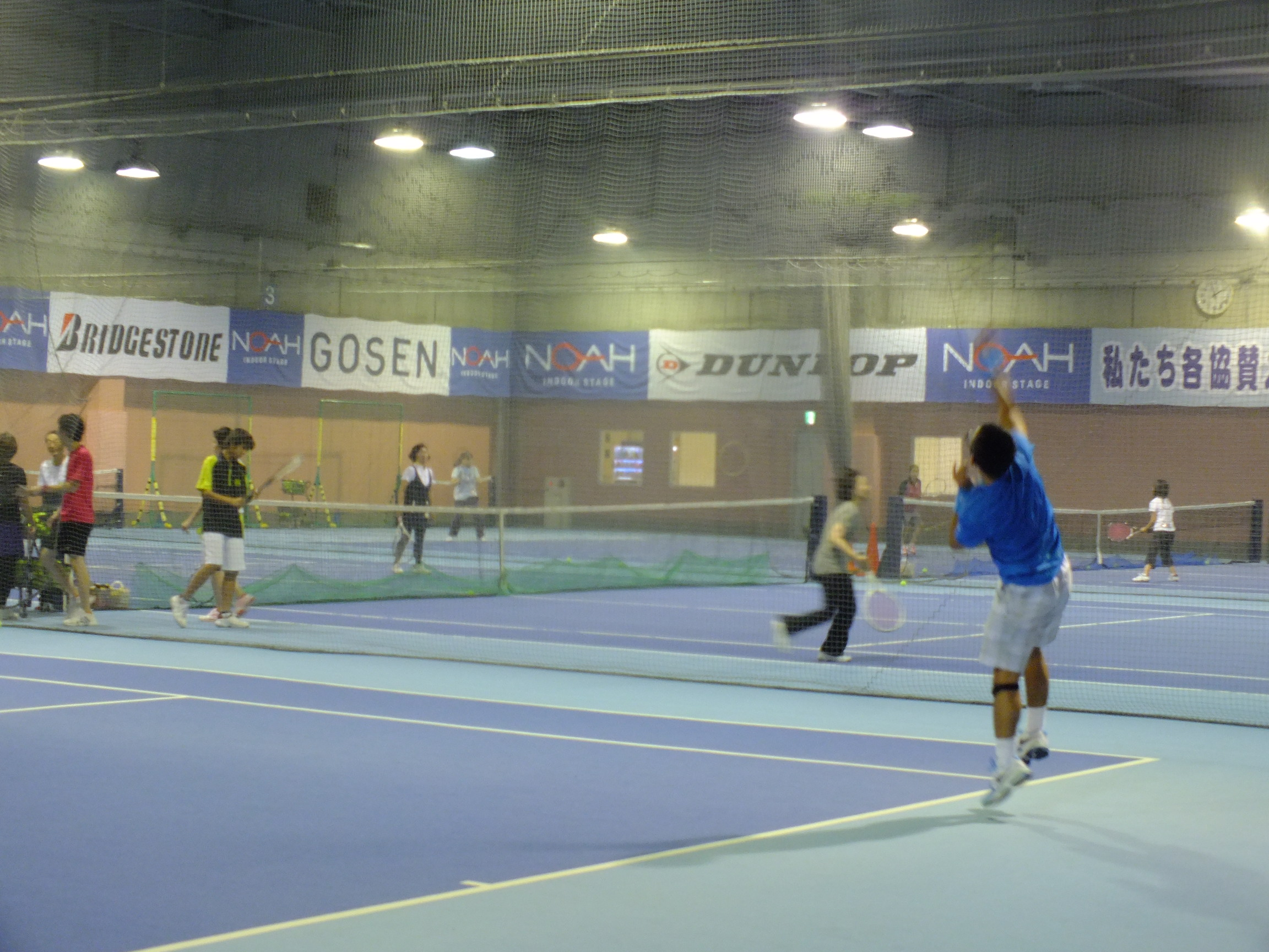 Noah Indoor Stage HAT Kobe テニススクール・ノア HAT神戸校